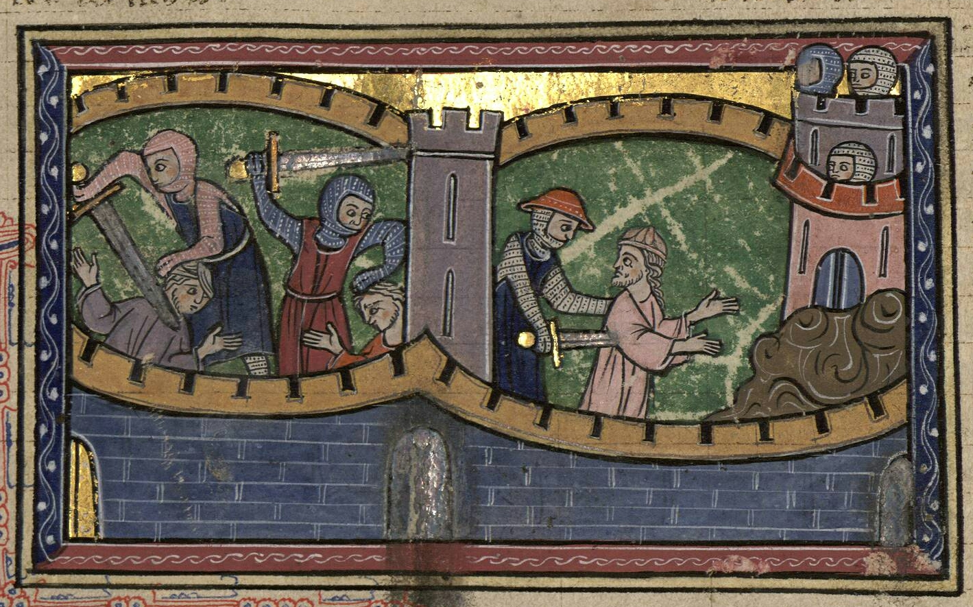 Massacre des habitants d'Antioche (1098) Česky: Vraždění obyvatel Antiochie